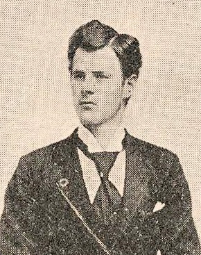 Ferdinandy Gyula 1896-ban szolgabíróként